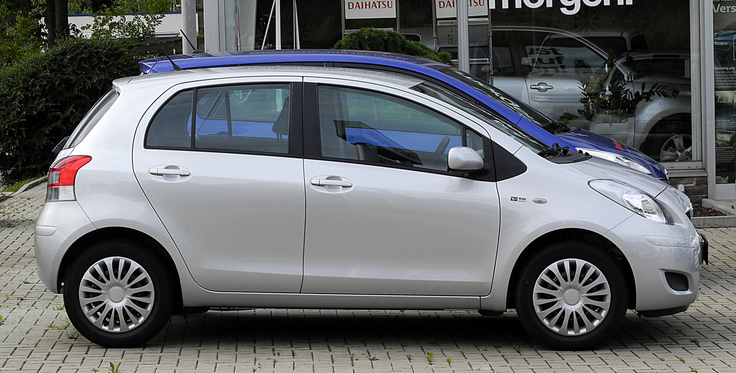 Daihatsu Charade 1.33 Basis (V)